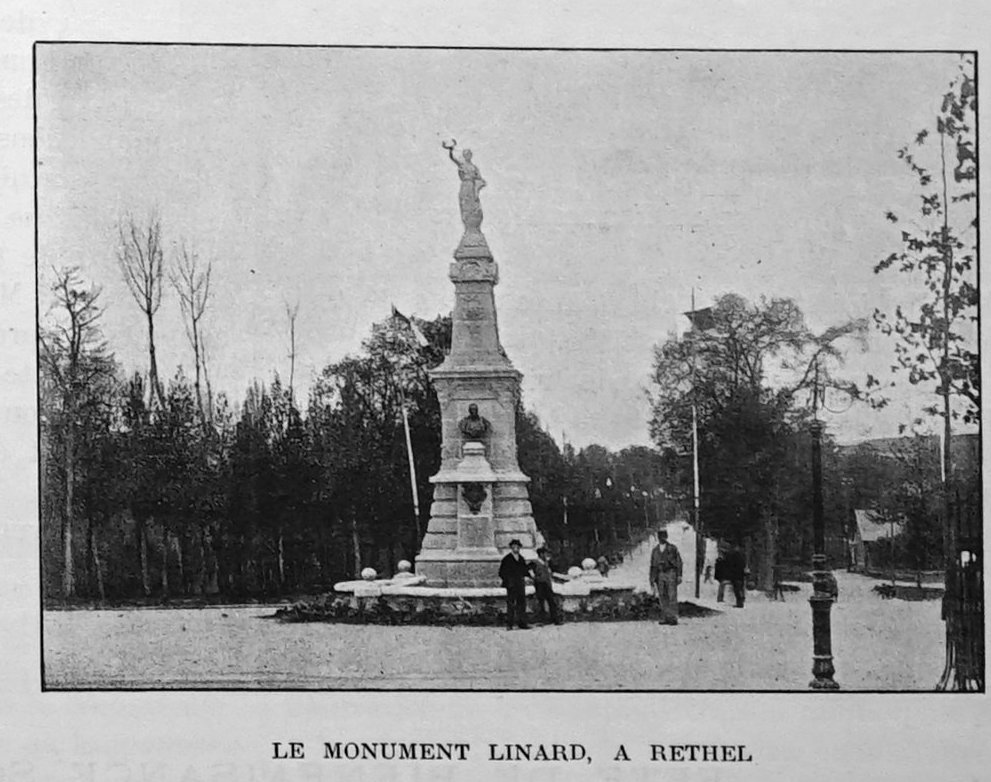 extrait de la "revue régionale illustrée" de juin 1900.